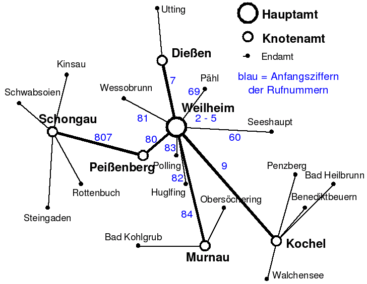 Netzstruktur des weltweit ersten Telefon-Selbstwaehlfernnetzes der Welt in Weilheim, Start 1923